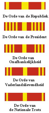 Orde van Verdienste van de Nationale Opbouw Korea 1949 batons